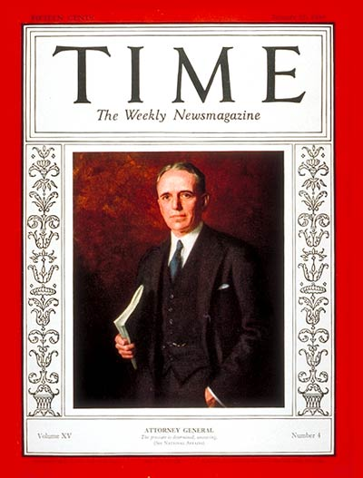 William D. Mitchell